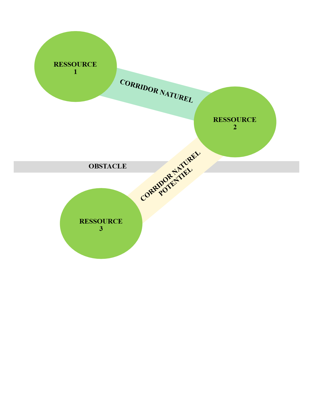 Les corridors permettent le déplacement des espèces entre plusieurs milieux pour trouver les ressources nécessaires au déroulement de leur cycle de vie.